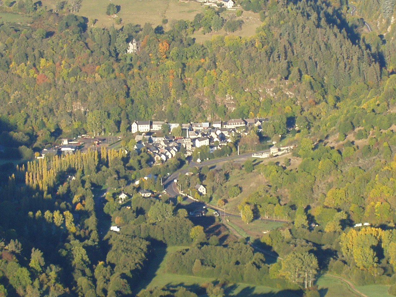 Vue du village de Chambon-sur-Lac Antoine Laydier